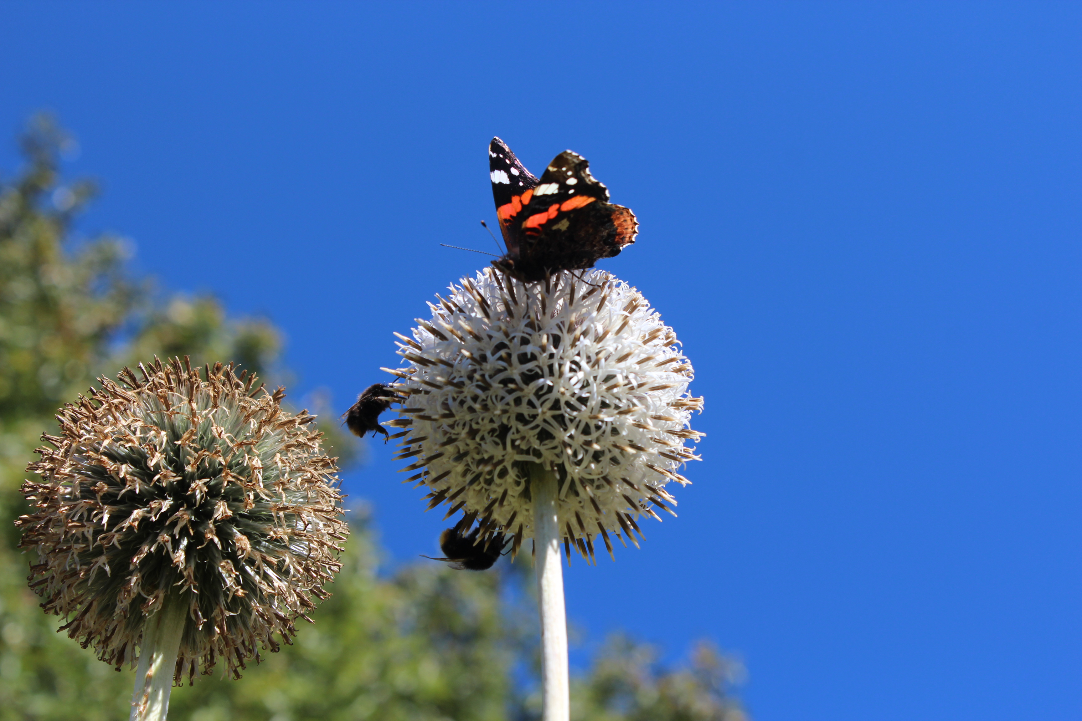 Echinops exaltatus - Giardino Botanico Alpino Viote